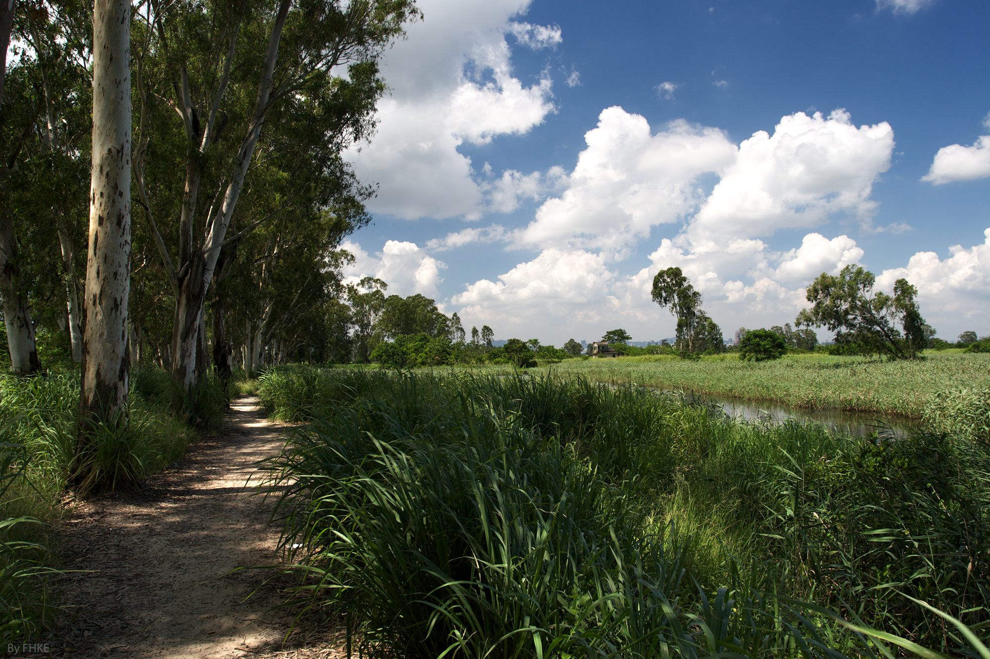 南生圍 Nam Sang Wai